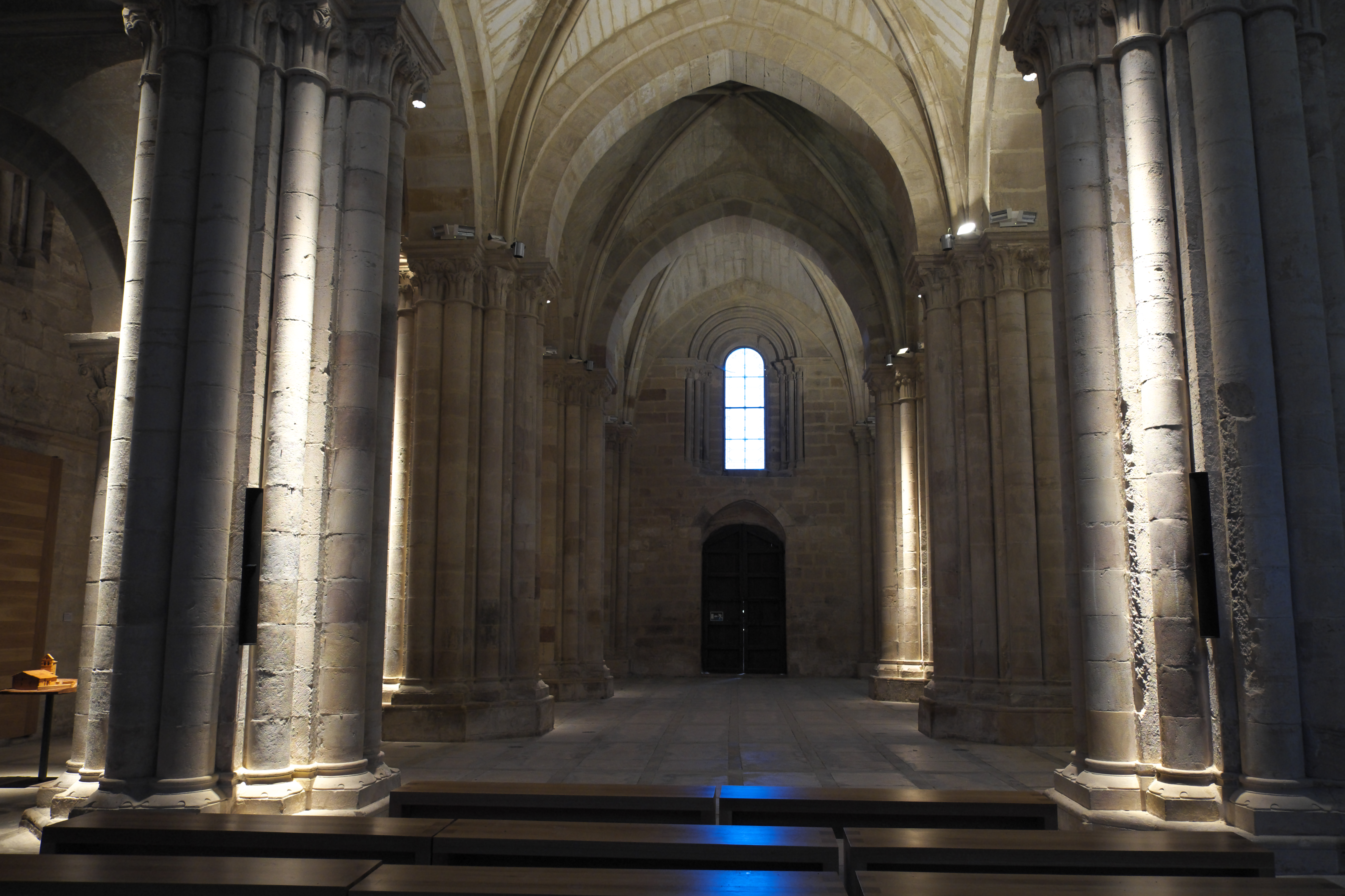 Ehemaliges Prämonstratenserkloster Santa María la Real in Aguilar de Campoo in der Provinz Palencia (Kastilien-León/Spanien), Innenraum der Kirche